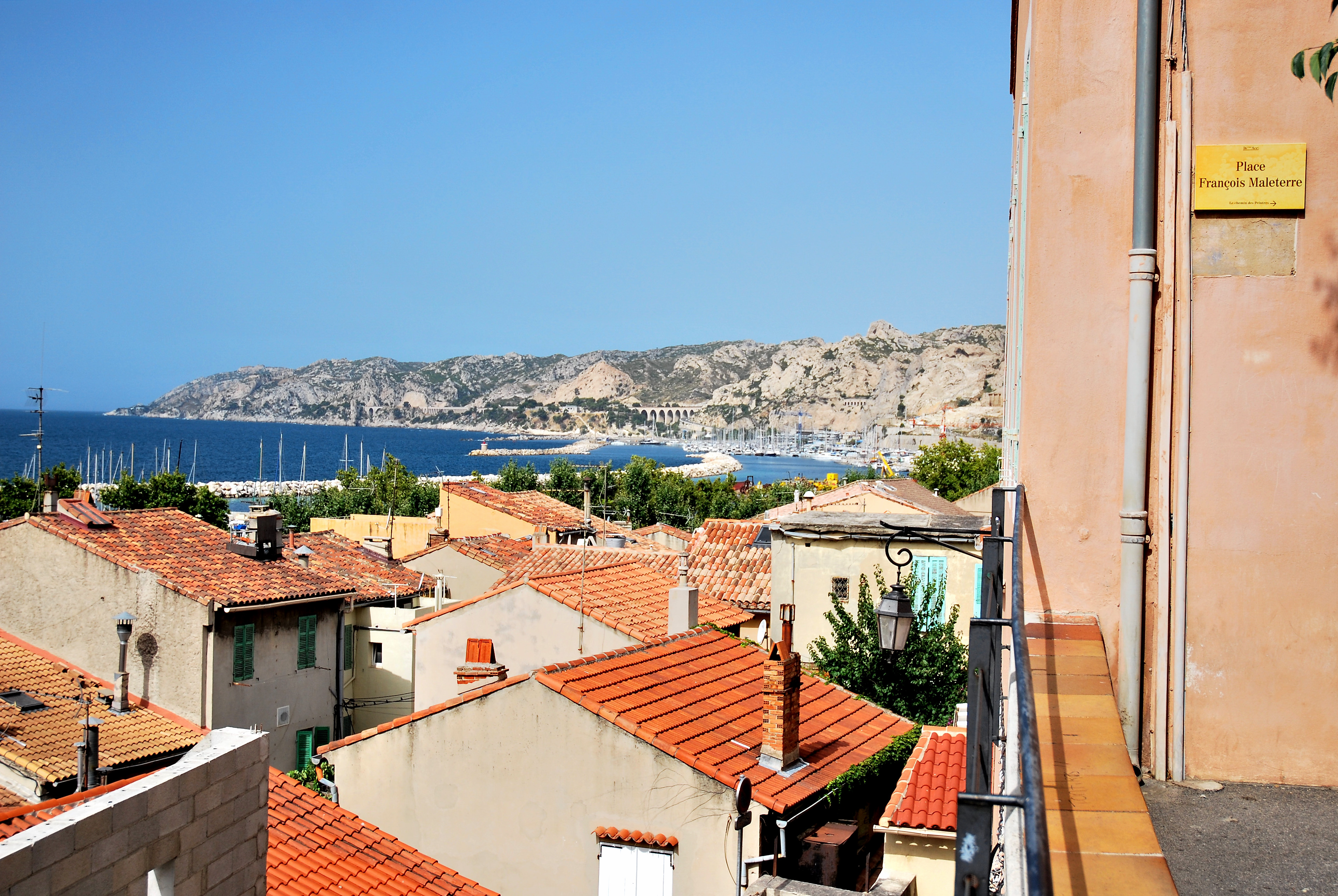 Vue du port et du massif de l'Estaque, depuis la place François Maleterre, dans le quartier de l'Estaque, 16e arrondissment de Marseille.